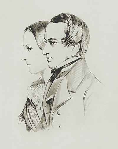 Григорий Петрович Волконский с женой Марией Александровной, ур. Бенкендорф (1820—1880).